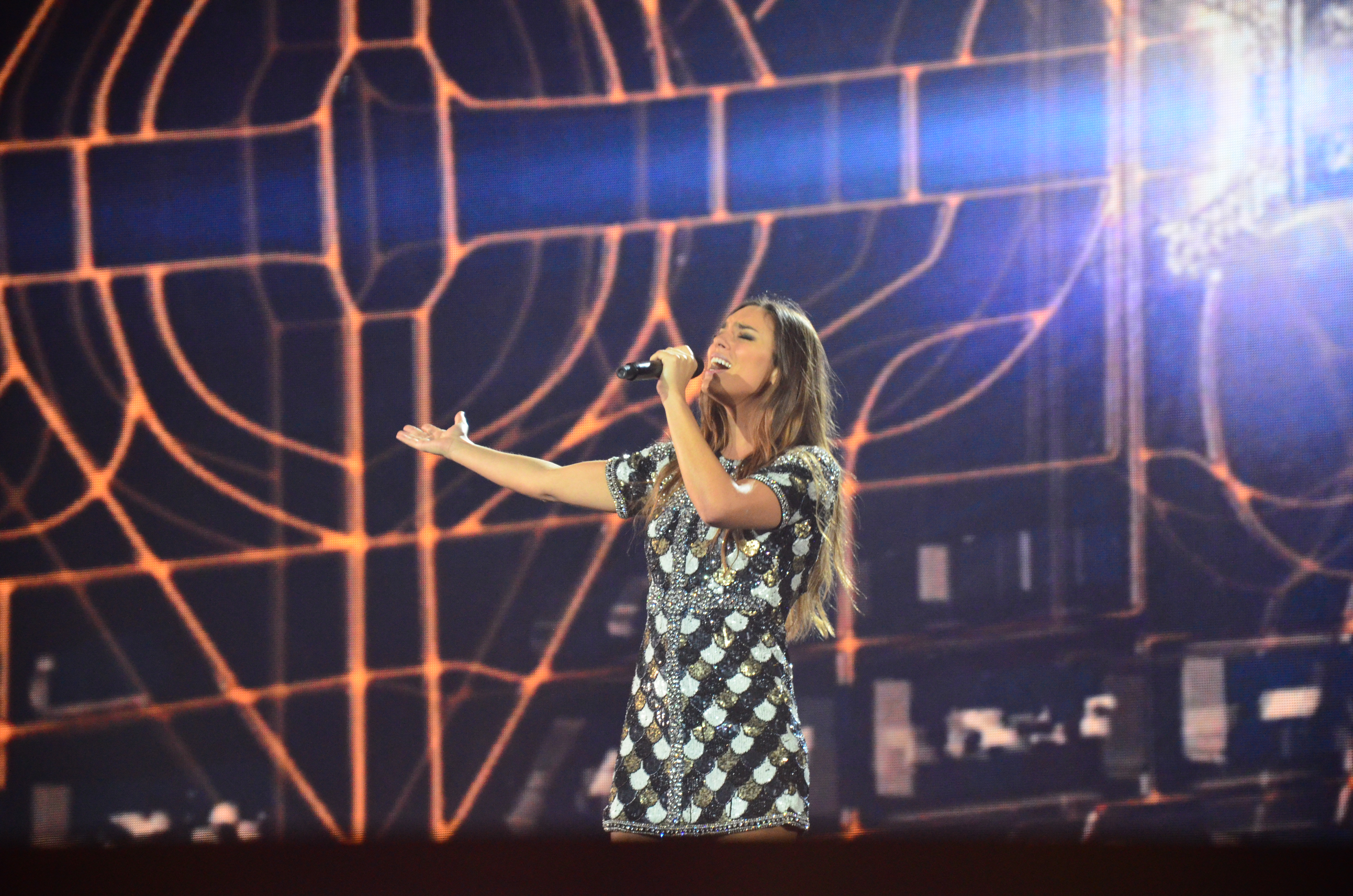 10 травня 2017 року у Києві відбулась генеральна репетиція 2 півфіналу "Євробачення".